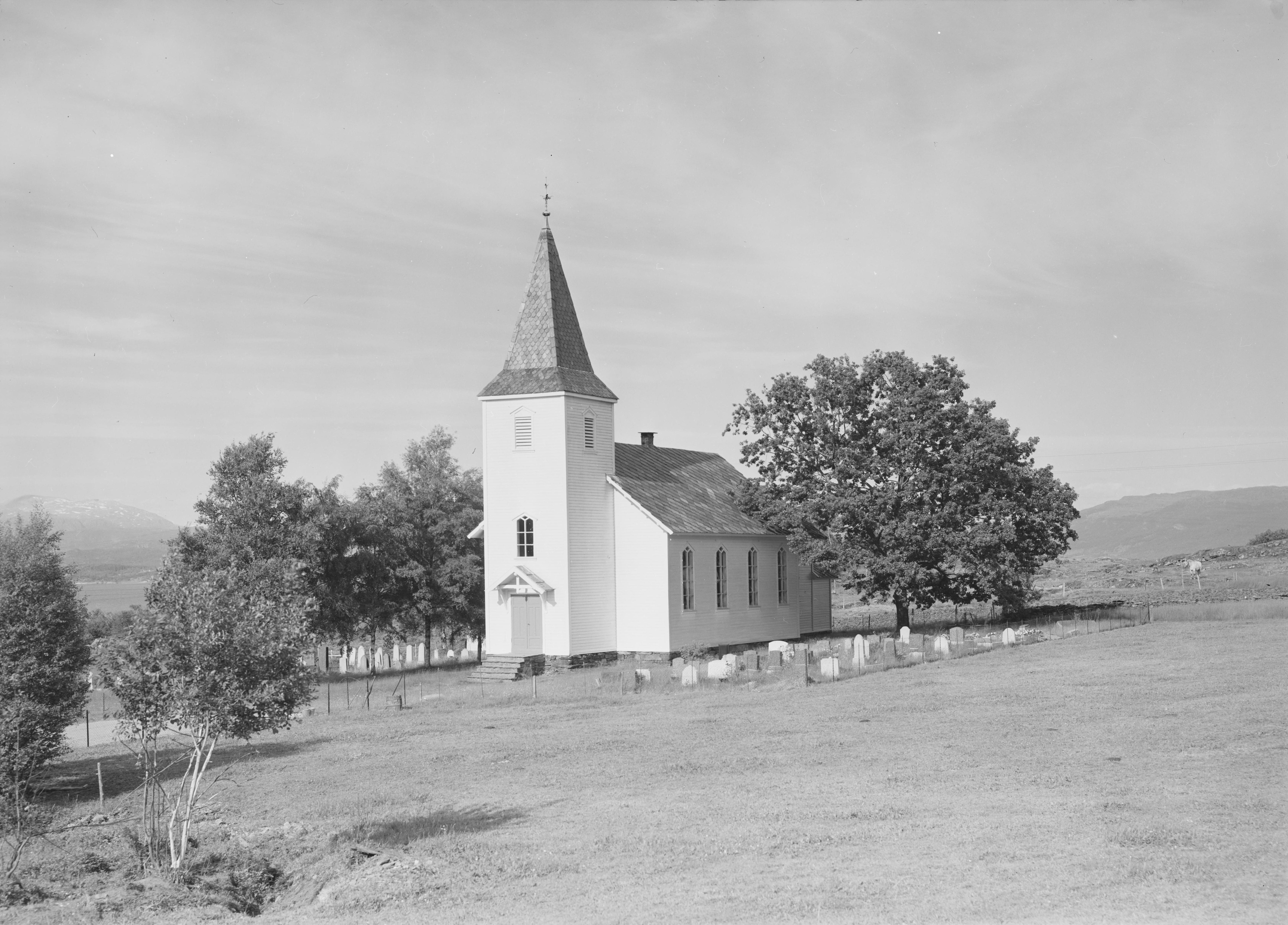 Bildet er hentet fra Nasjonalbibliotekets bildesamling. Anmerkninger til bildet var: Fotograf ukjent. Innbjoa, Vindafjord, Rogaland. Bjoa kyrkje / Bjoa kirke fra 1895, ark. Hartvig Sverdrup Eckhoff